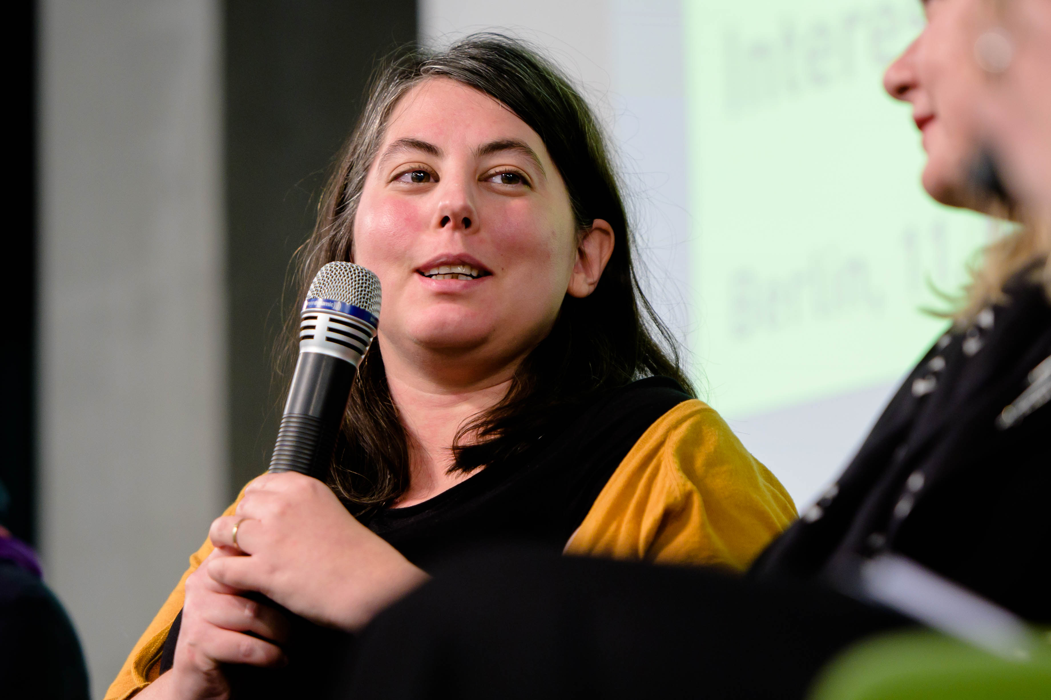 Anna Mayrhauser auf dem Diskussionsabend "Das geht gar nicht!" im November 2019 bei der Heinrich-Böll-Stiftung